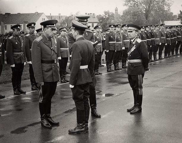 Инспекторская проверка 39 ГМСД